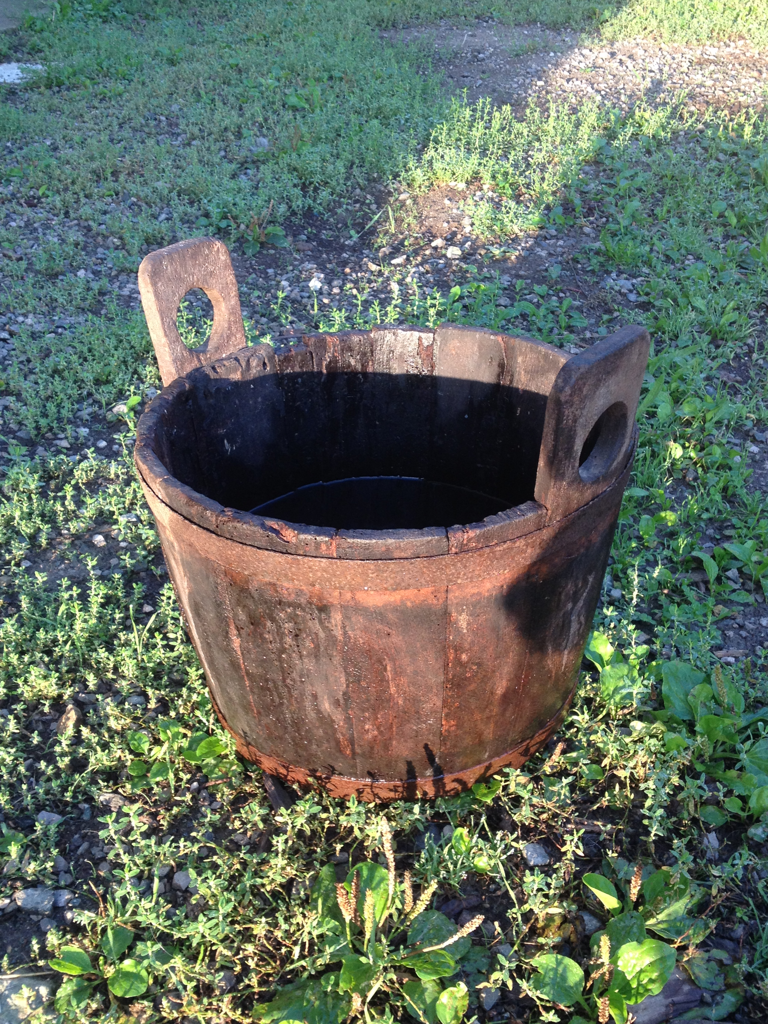 Bigoncia in legno, 1900 circa. Luogo di provenienza Stella (SV) - Italy